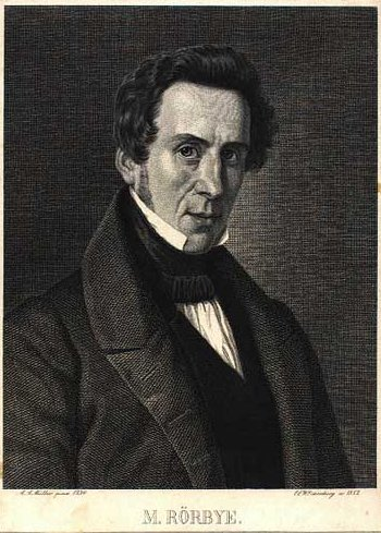 Martin Christian Wedseltoft Rørbye (1803-1848), norsk-dansk guldaldermaler